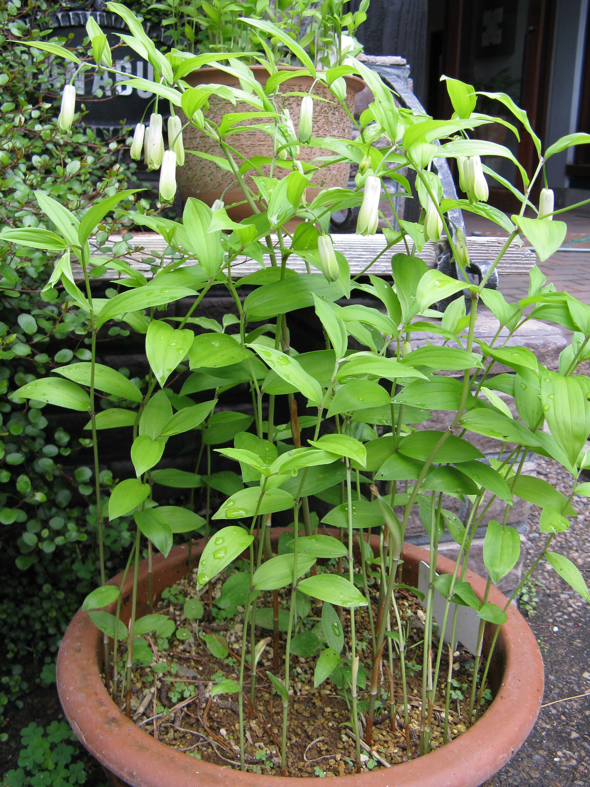 Scientific name Disporum sessile